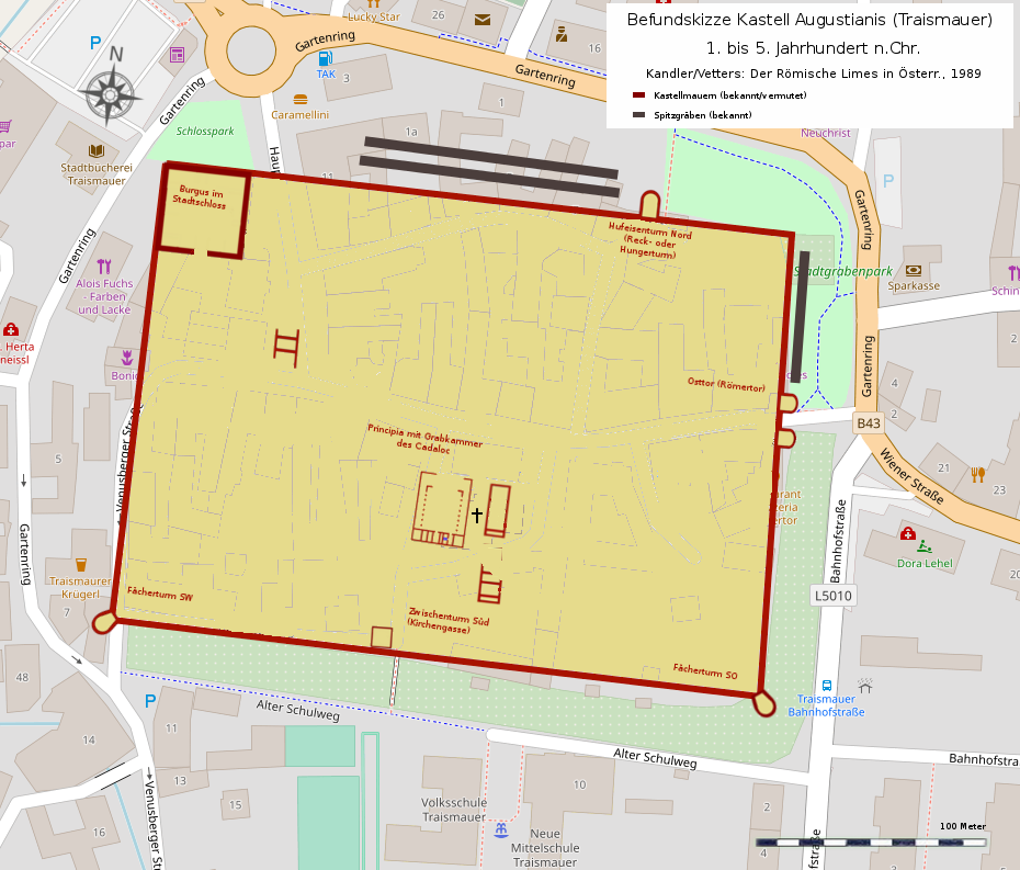 Befundskizze des spätantiken Kastell Augustianis unter der Altstadt von Traismauer. Object location48° 21′ 01.91″ N, 15° 44′ 44.52″ E